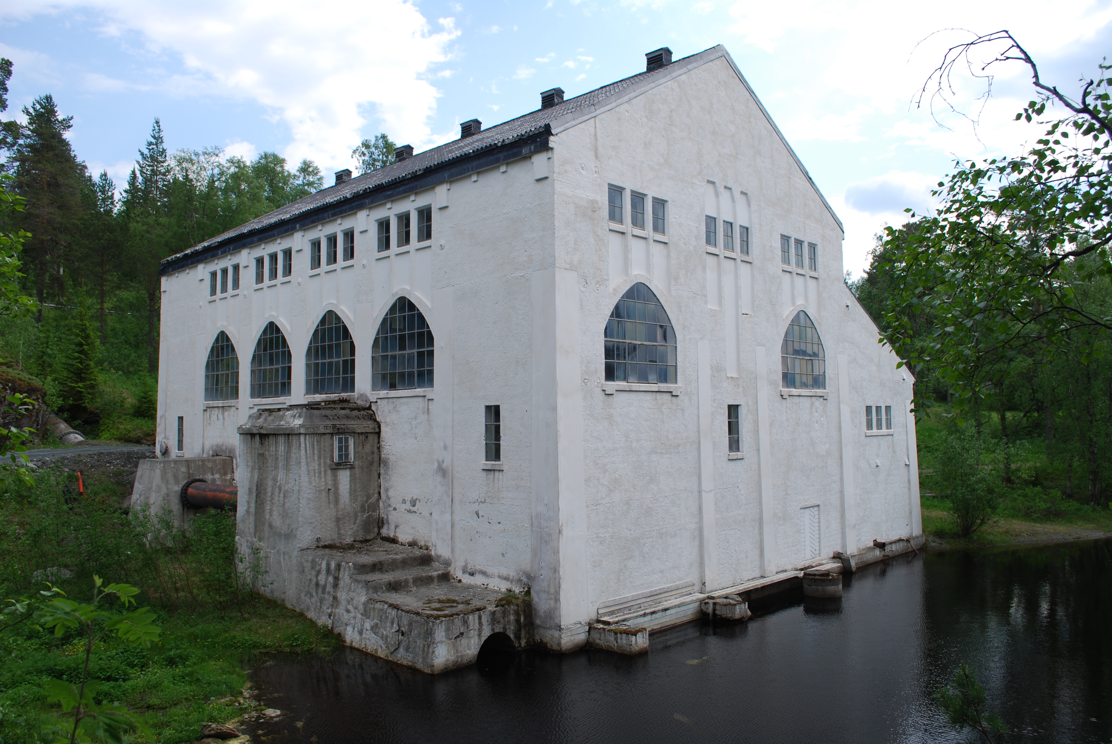 Kraftverket til Meråker smelteverk i Kopperå, som produserte elektrisitet i perioden 1915 til 1994. Bygget er i dag en del av Industrimuseet i Kopperå, og inneholder generatorer, turbiner og andre gjenstander relevant til kraftproduksjonen.